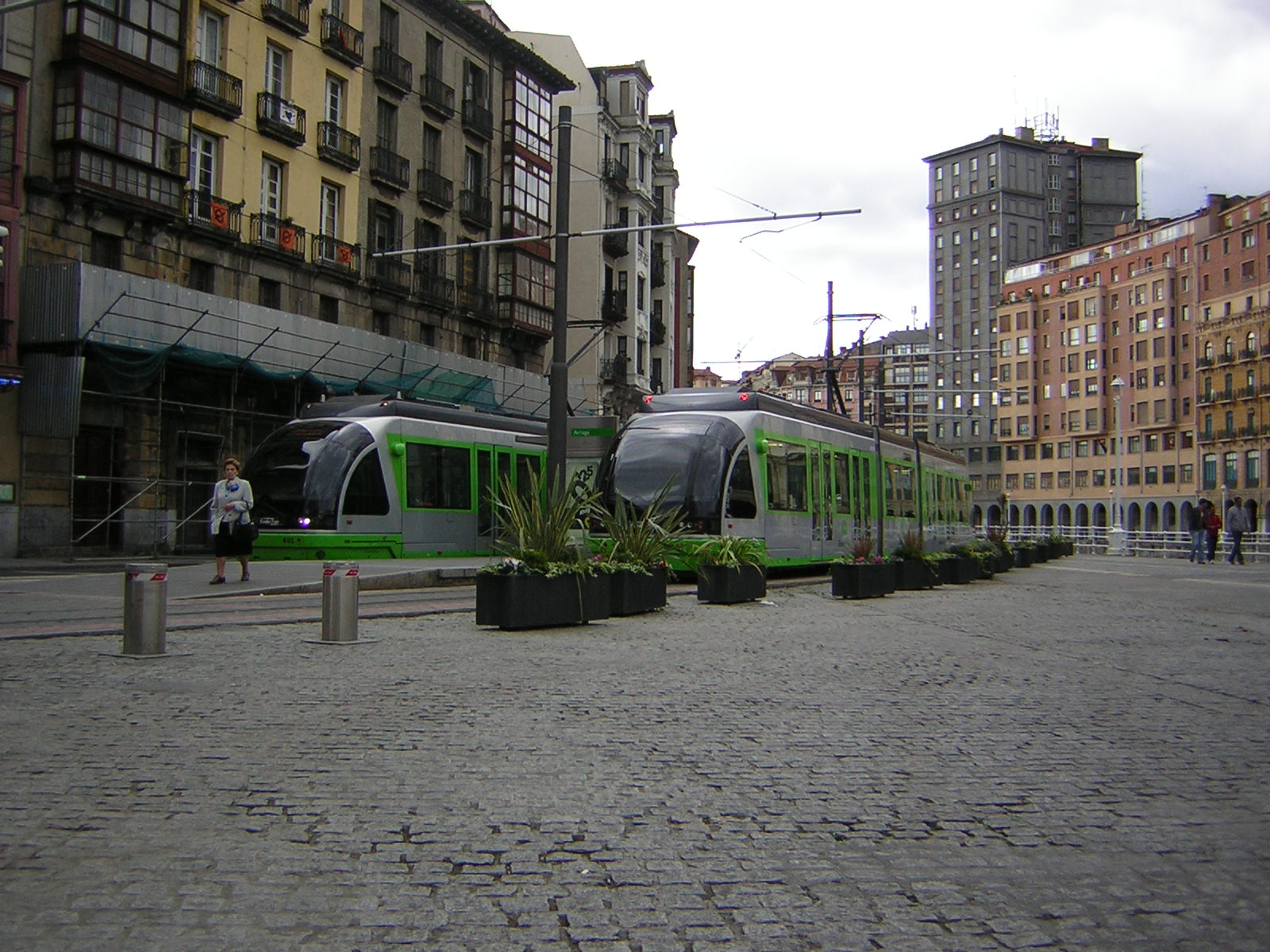 Bilbao (Spain)